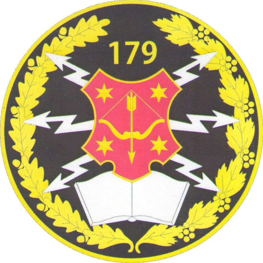 179-й об'єднаний навчально-тренувальний центр військ зв'язку